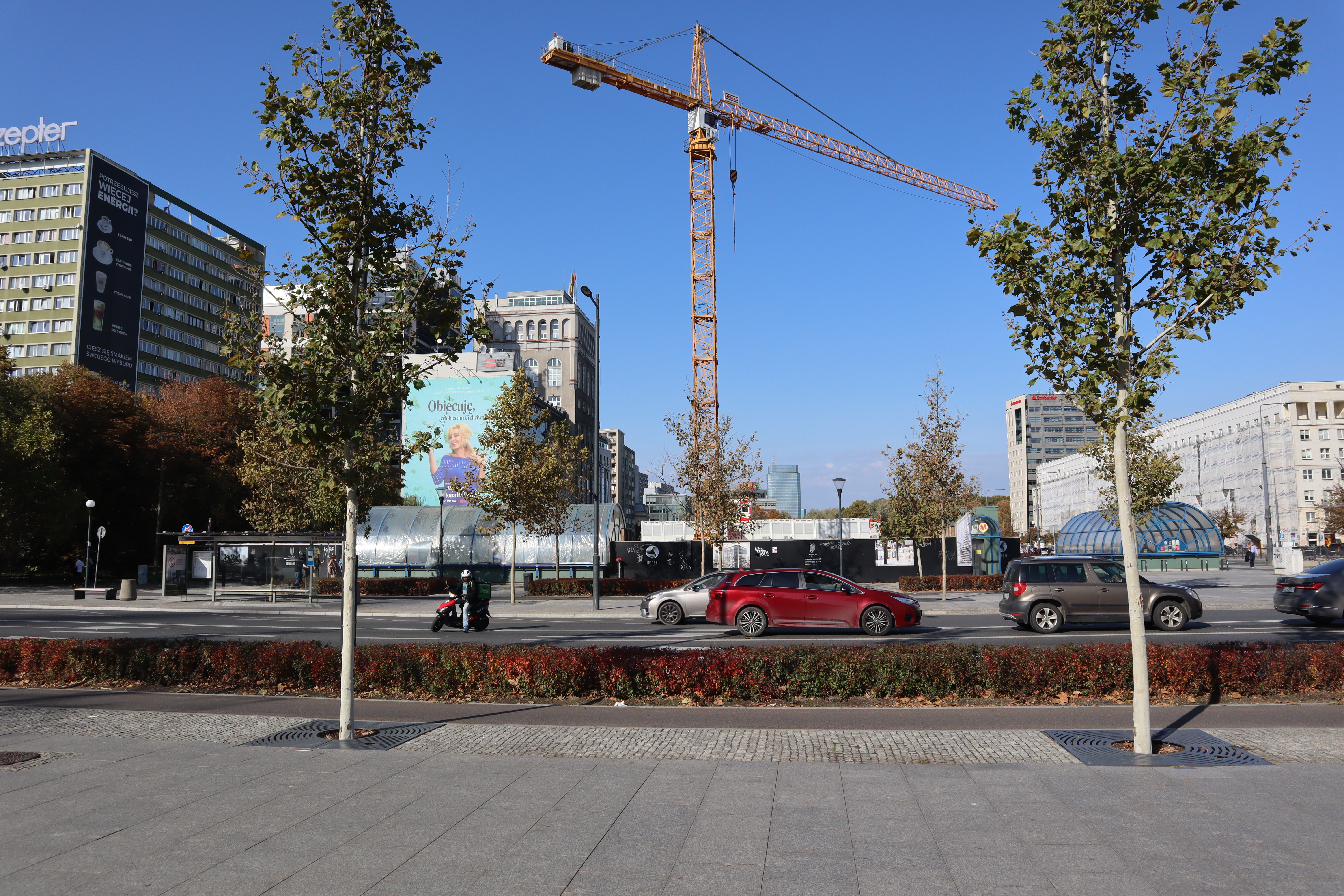 Central Point, Warschau